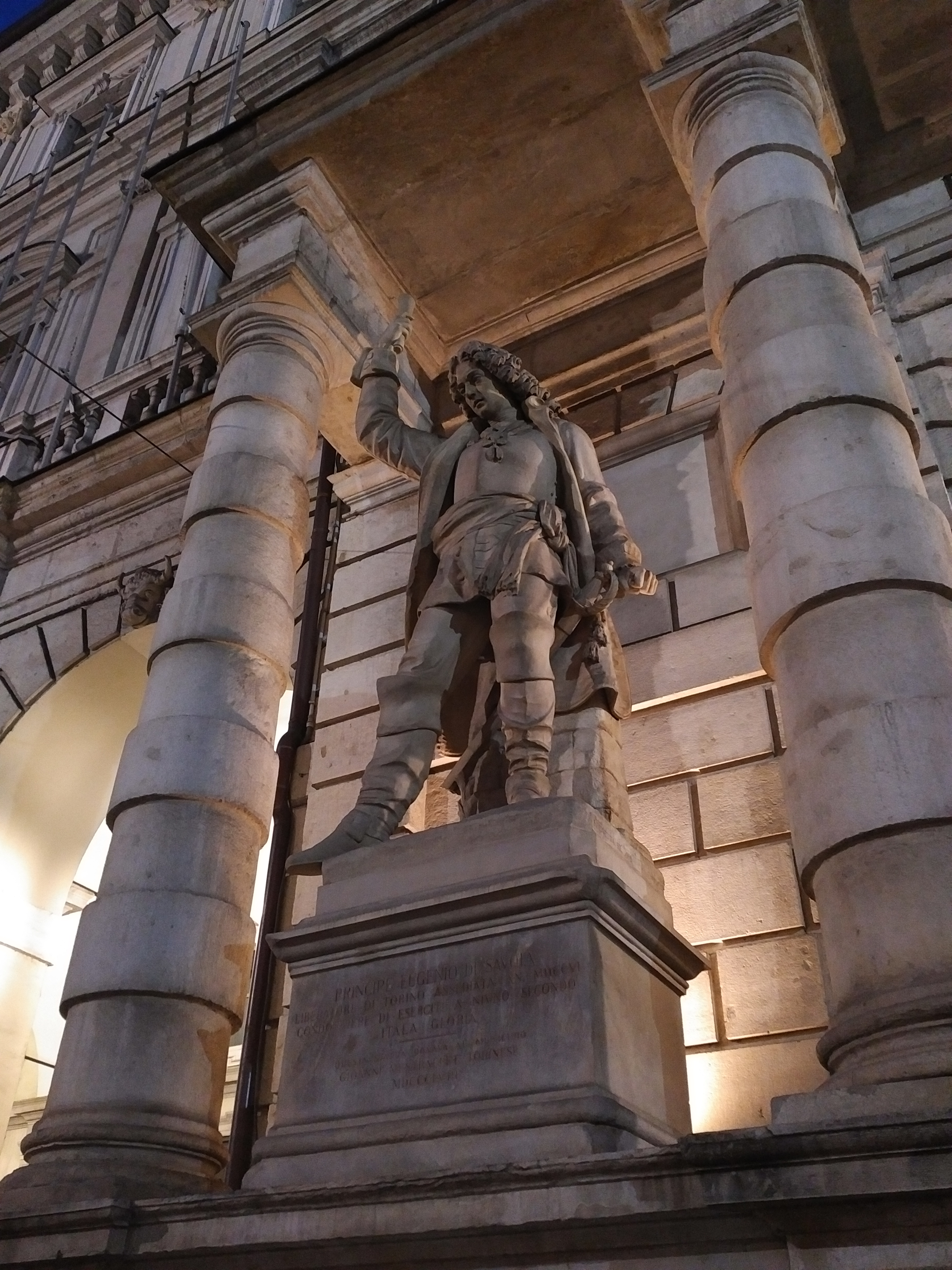 Il Palazzo Civico di Torino, Principe Eugenio di Savoia.